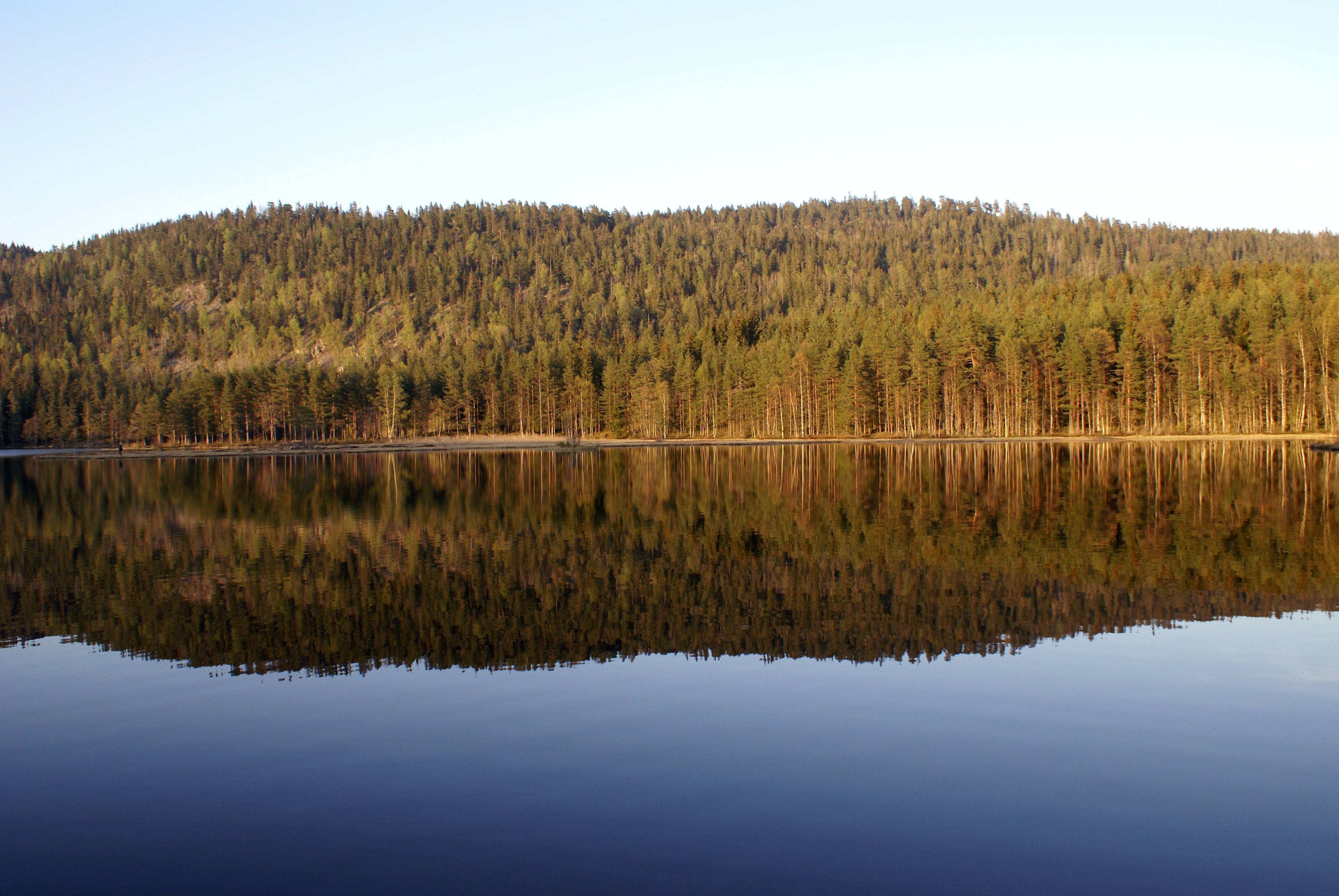 Evening in may, Burudvann